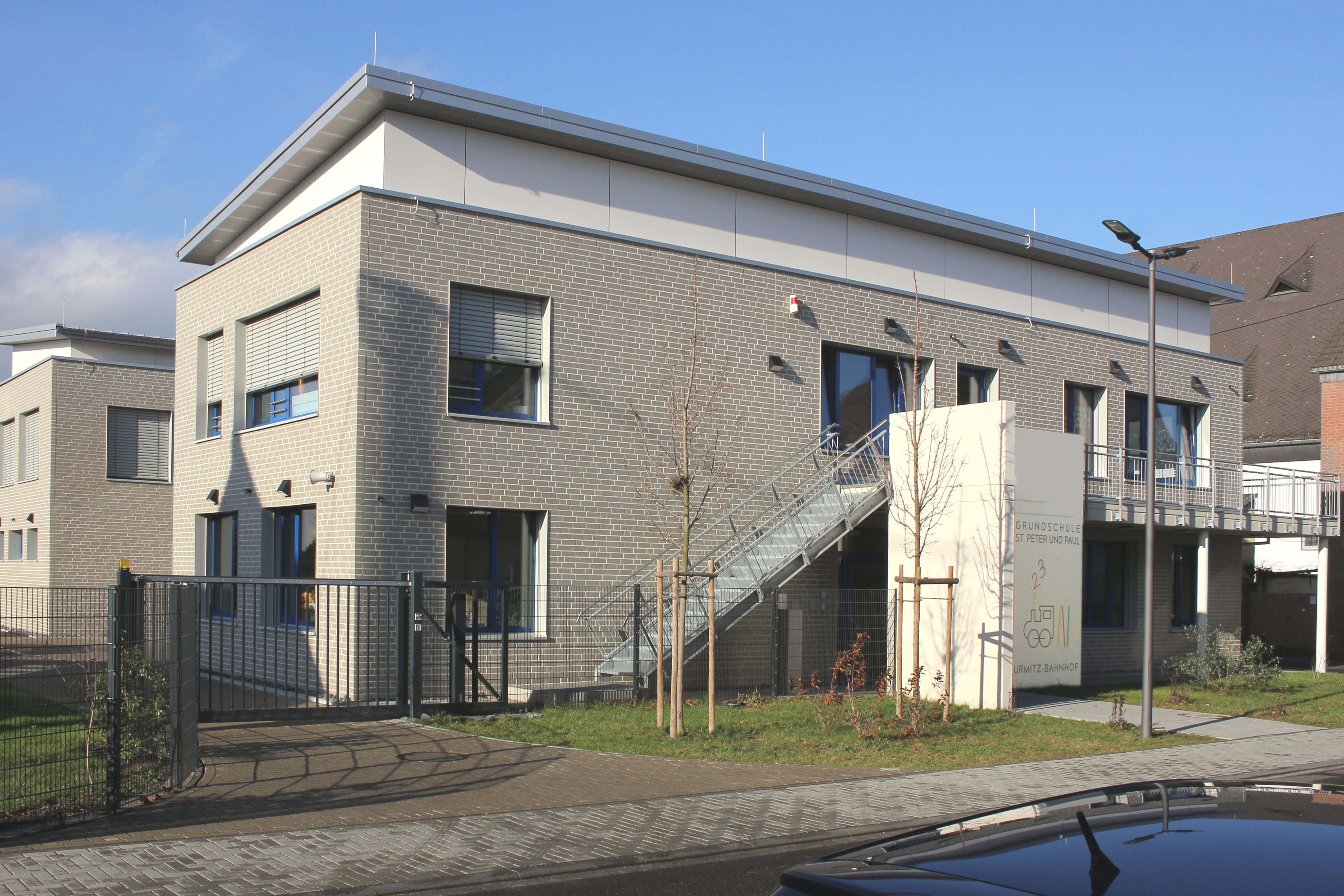 Grundschule St. Peter und Paul in Mülheim-Kärlich, Stadtteil Urmitz-Bahnhof